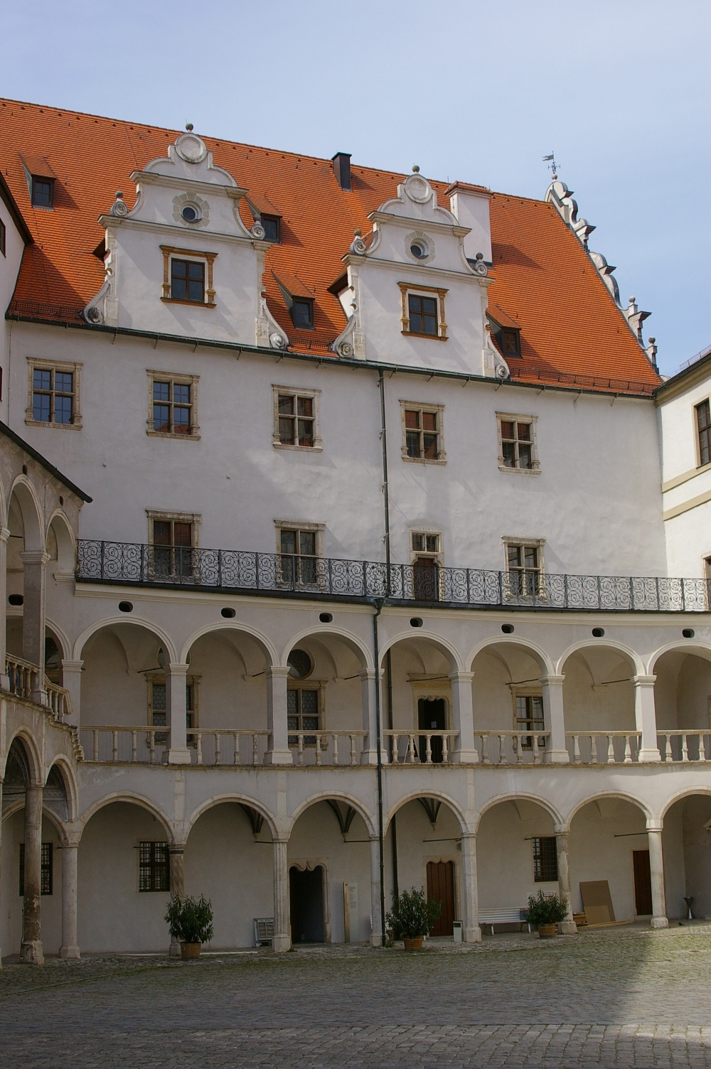 Stadtschloss in Neuburg an der Donau, Innenhof.